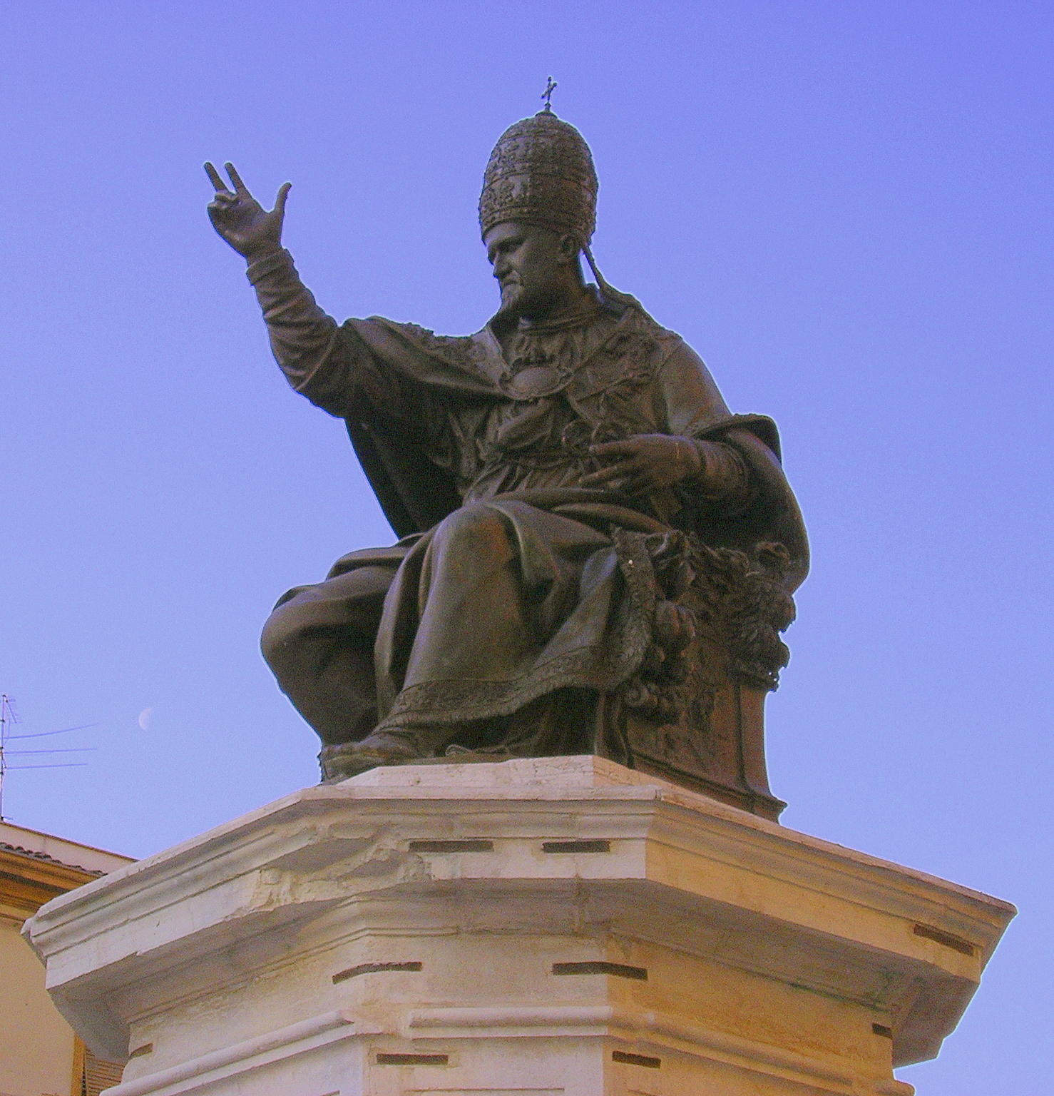 Camillo Borghese è il Pontefice Paolo V (Paulus V), che siede dal 1615 sul trono al centro di Piazza Cavour a Rimini. La statua fu eretta come ringraziamento della città al nuovo pontefice che nominò cardinale il riminese Michelangelo Tonti, già arcivescovo di Nazareth, mentre al contrario il papa precedente Clemente VIII mortificò la città assoggettandone il vescovo all'arcivescovo di Ravenna. Paolo V, eletto al soglio nel 1605, adottò prontamente il figlio della sorella Ortensia Caffarelli e lo nominò cardinale all'età di soli 29 anni. Il figlio-nipote prese così il cognome dello zio-Papa; si trattava del Cardinale Scipione Caffarelli-Borghese, eclettico mecenate e collezionista romano che con Paolo V, appunto, concretò il sogno di creare a Roma un grande parco che testimoniasse la grandezza della loro famiglia. E' il famoso parco di Villa Borghese che ospita la collezione d'arte della nobile famiglia di origine senese tra le cui opere si annoverano anche Caravaggio, Bernini, Raffaello e Tiziano. Paolo V morì nel 1621, il figlio-nipote Cardinale Scipione Caffarelli-Borghese nel 1633. La statua di Piazza Cavour risale al 1613 ma il suo copricapo attuale fu ripristinato solo nel 1890. Infatti, temendo ritorsioni dell'esercito napoleonico, nel 1800 la tiara originaria fu sostituita con la mitra e l'iscrizione venne sostituita con un'altra che indicava nella figura rappresentata San Gaudenzo patrono di Rimini, non un pontefice.